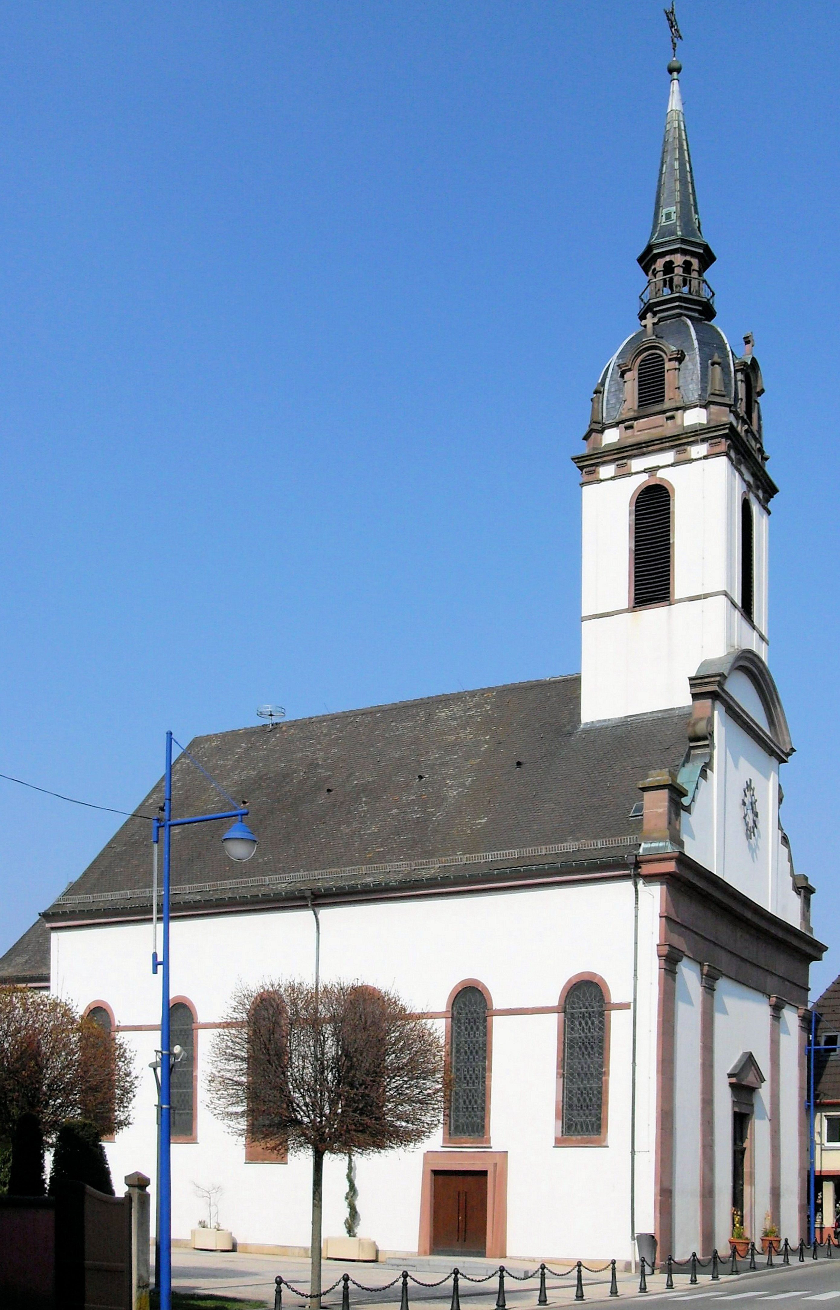 L'èglise Saint-Martin à Sierentz